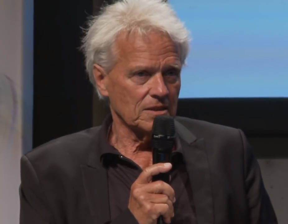 Geschäftsführender Direktor Institut für empirische Migrations- und Integrationsforschung der Humboldt-Universität zu Berlin